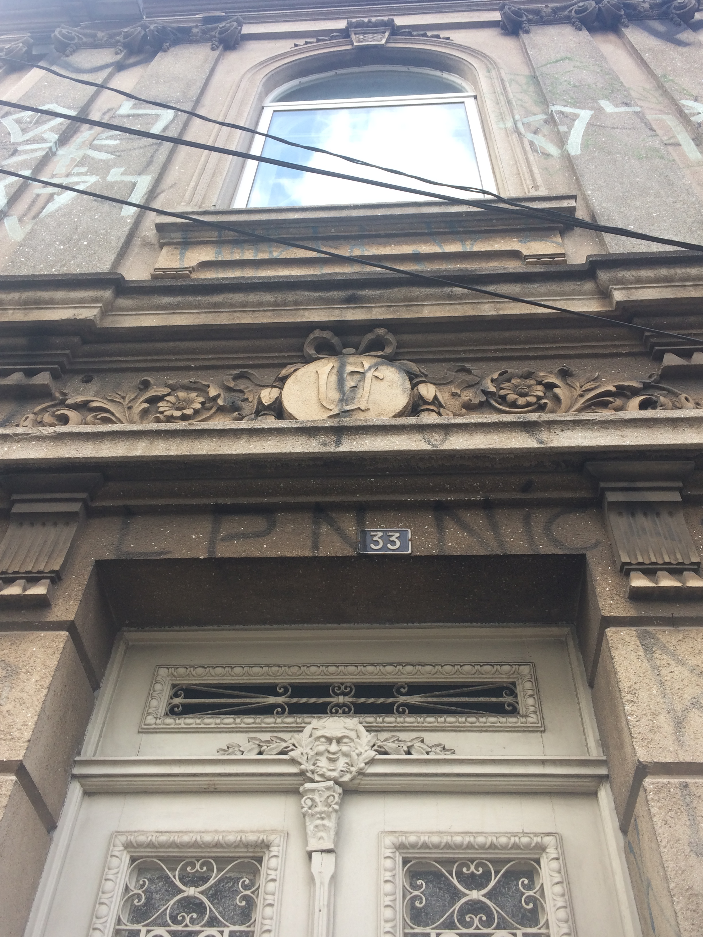 O edifício da Sociedade Beneficente União Fraterna está localizado na esquina das ruas Guaicurus e Faustolo, no bairro Água Branca, Zona Oeste de São Paulo.